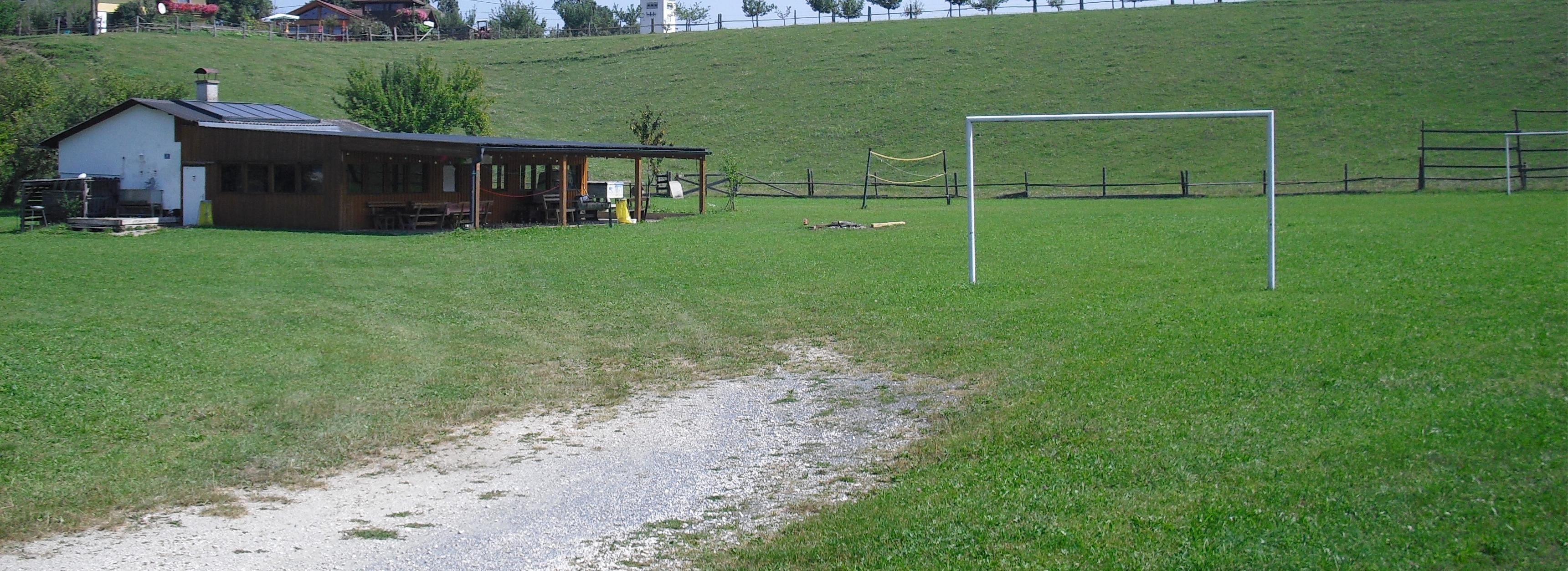 Euro Camp Gösselsdorf